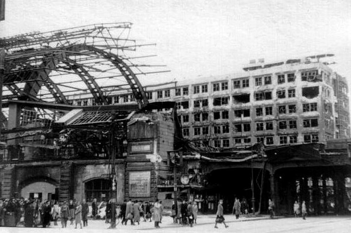 Berlin, Bahnhof Alexanderplatz, Schäden Berlin, Bahnhof Alexanderplatz.- Beschädigte Bahnhofshalle